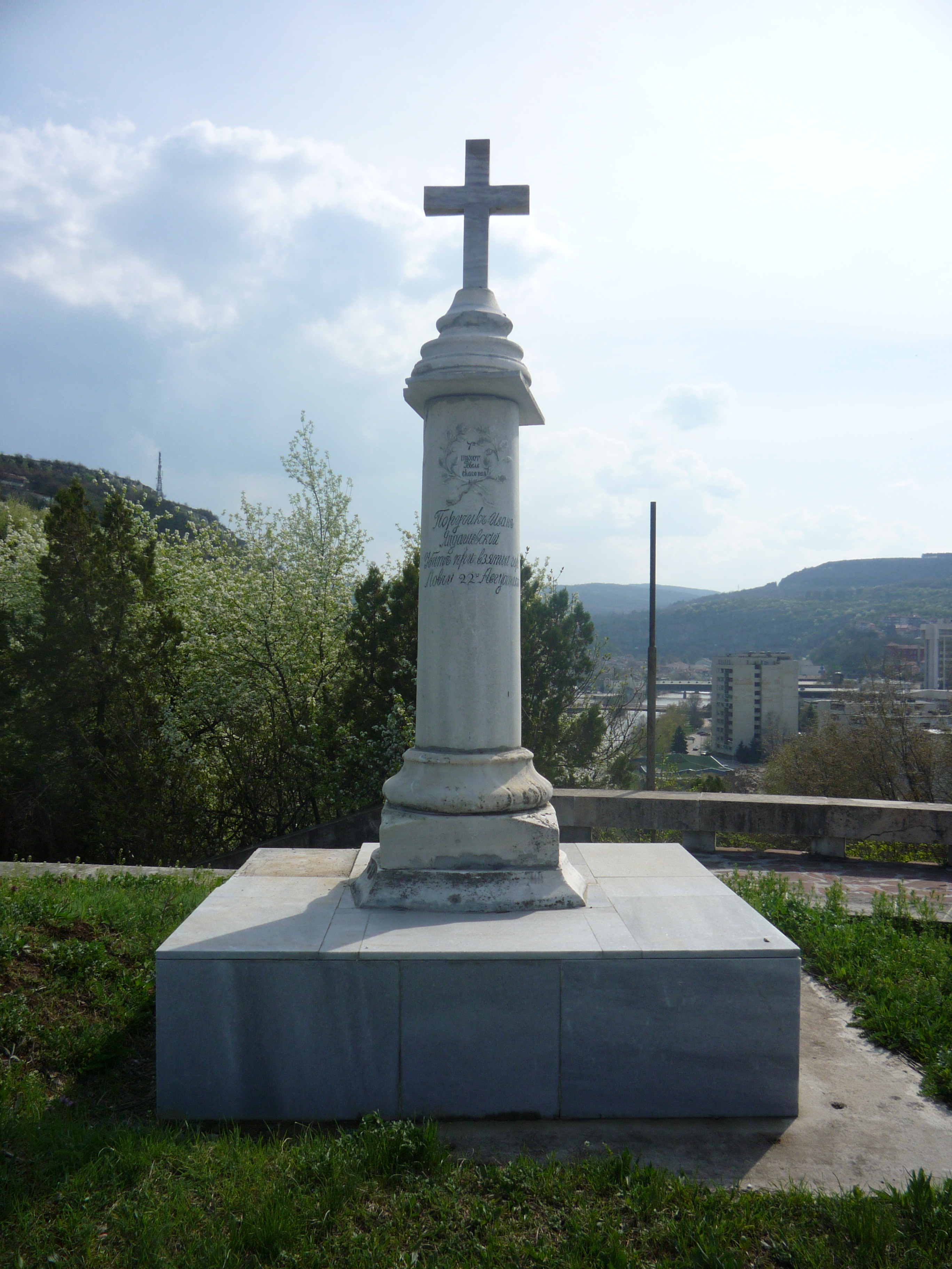 Надгробен паметник на поручик Иван Яндашевски. Загинал на 22 август 1877г., при освобождението на Ловеч в Руско-турската война 1877-1878г. Алея на Българо-руската дружба, хълма "Стратеш", град Ловеч.